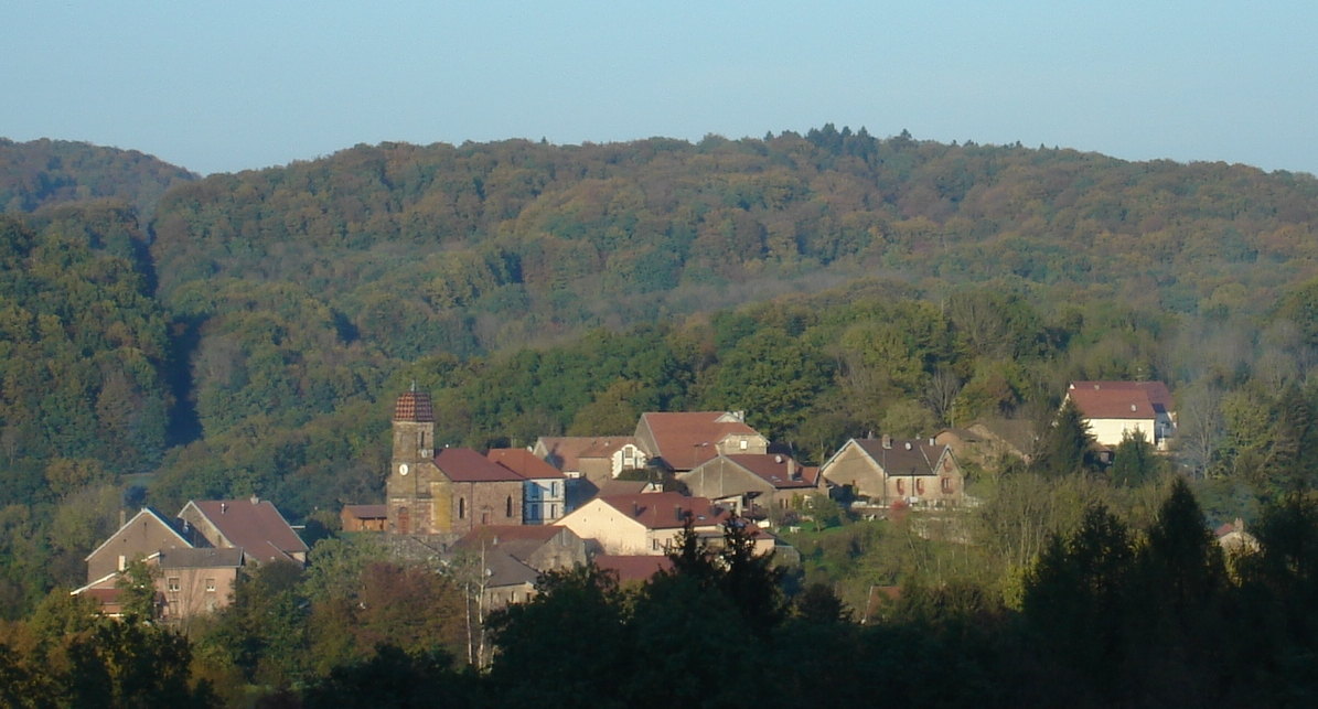 Belverne, village des bois